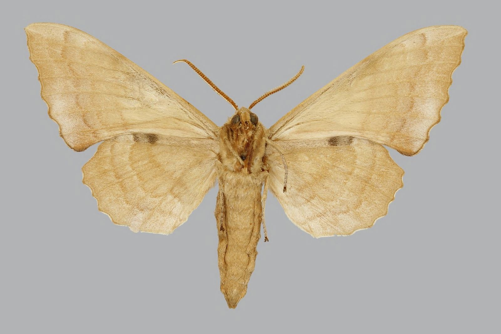 Laothoe populeti, male, underside. Armenia, Ordubad